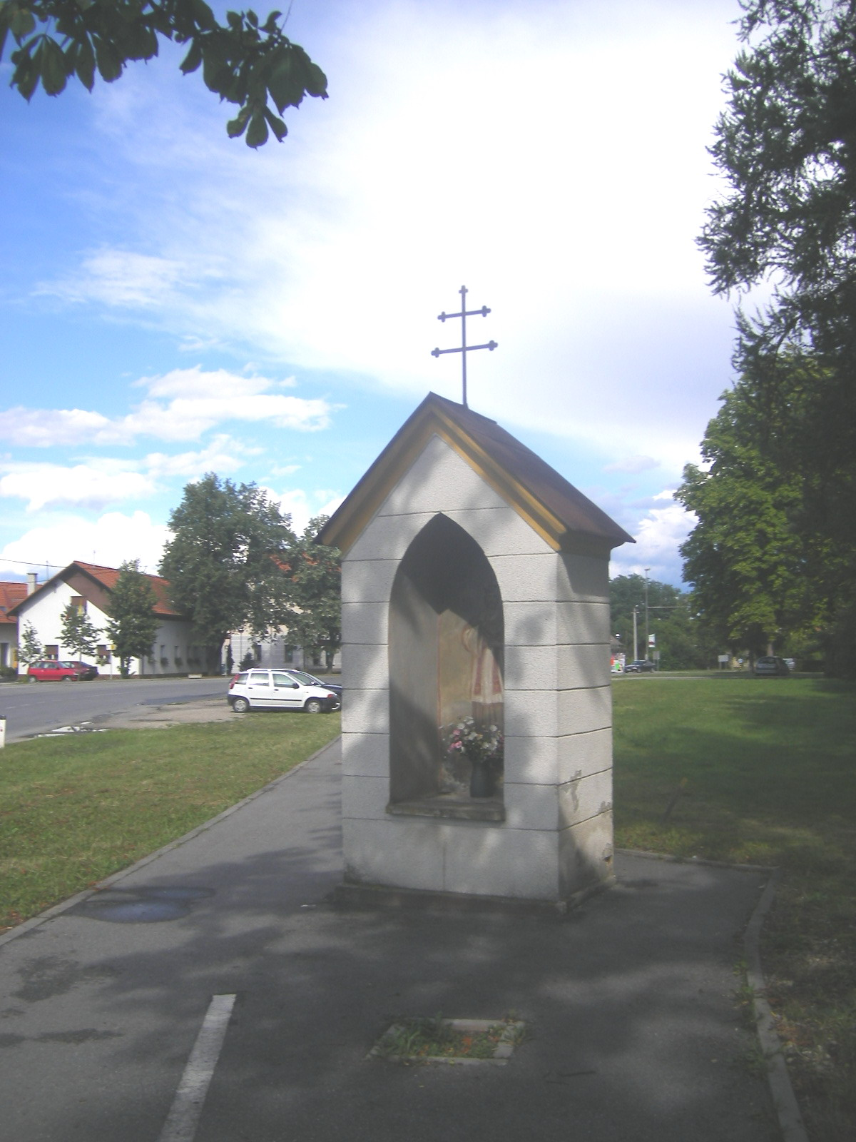 Tišina